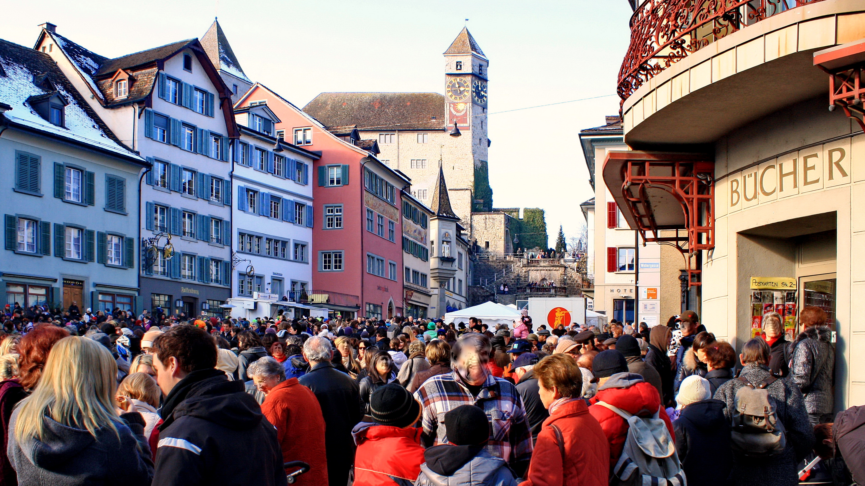 Eis-zwei-Geissebei at Rathaus on Hauptplatz in Rapperswil (Switzerland), Schloss Rapperswil (Zeitturm) in the background.